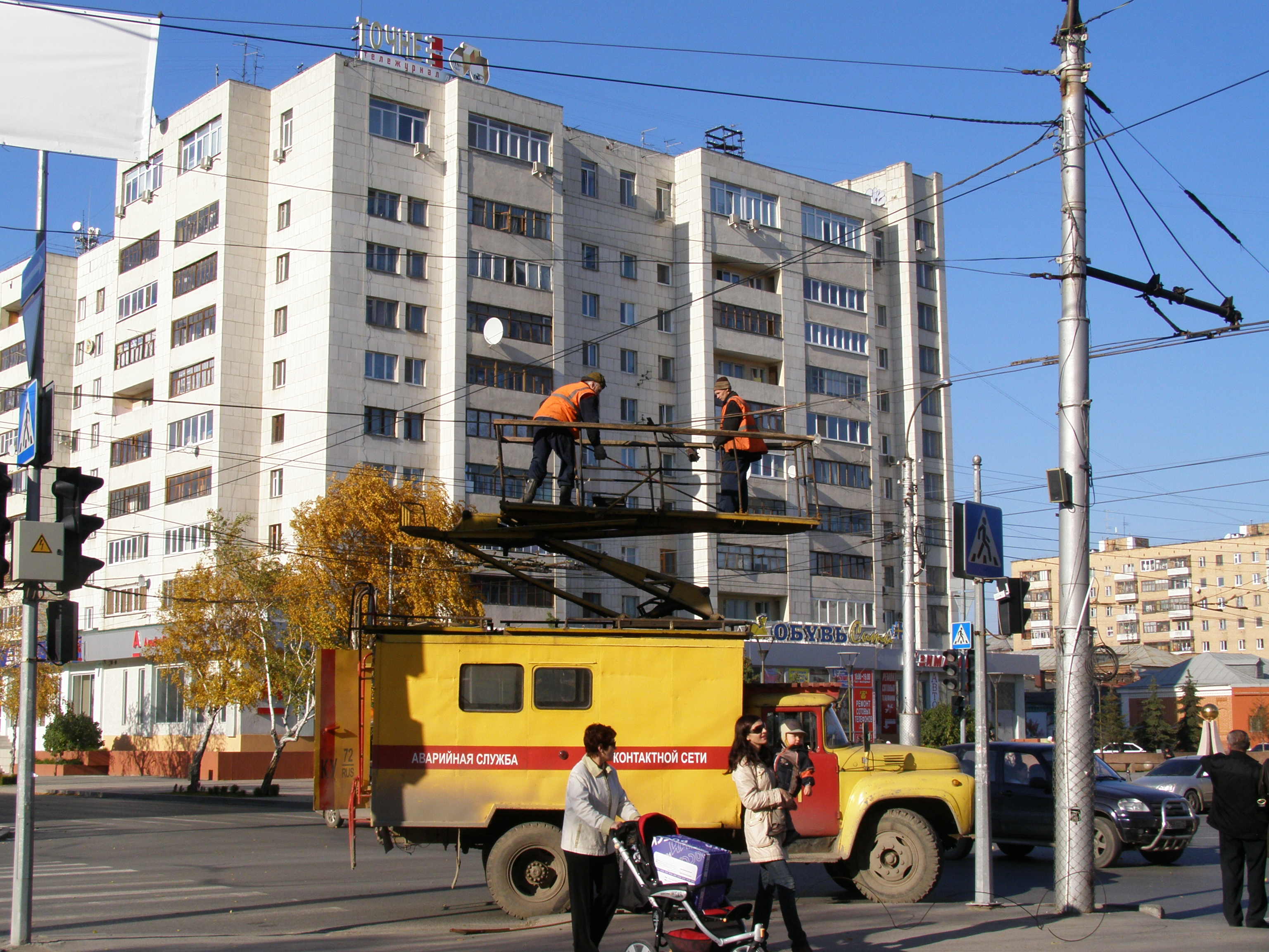 Riparado de trolebusaj kontaktolinioj ĉe kruciĝo de stratoj Lenin kaj Pervomajskaja. Tjumeno, Rusio.